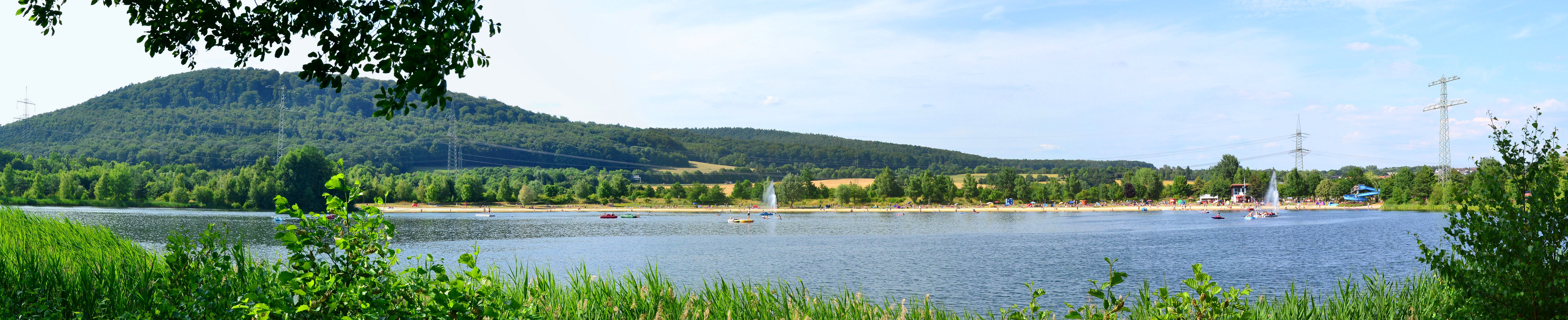 Panoramaaufnahme vo der Stockelache, Badesee bei Borken